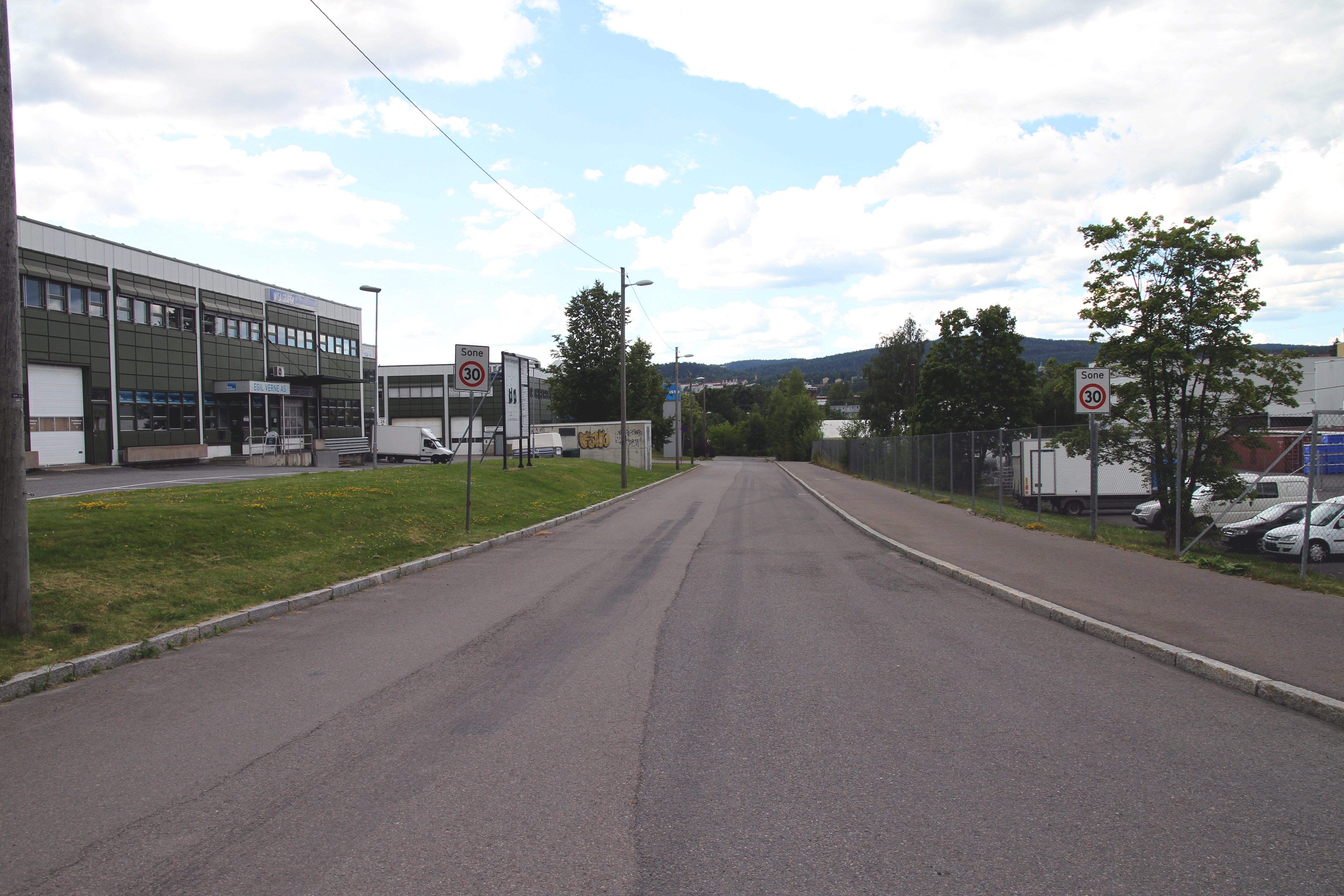 Alnaparkveien i Oslo